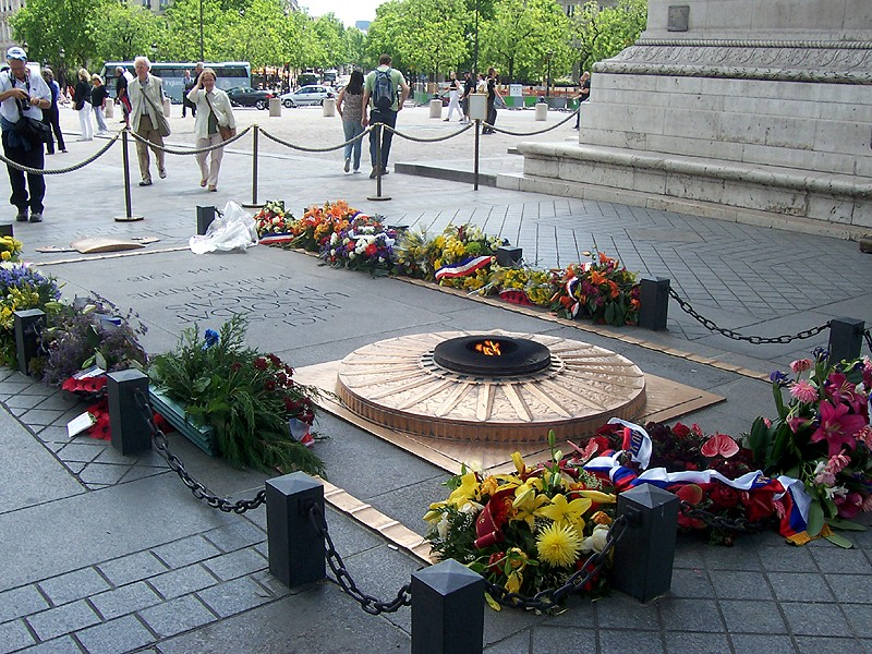 Parigi - Tomba del Milite Ignoto presso l'Arc de Triomphe